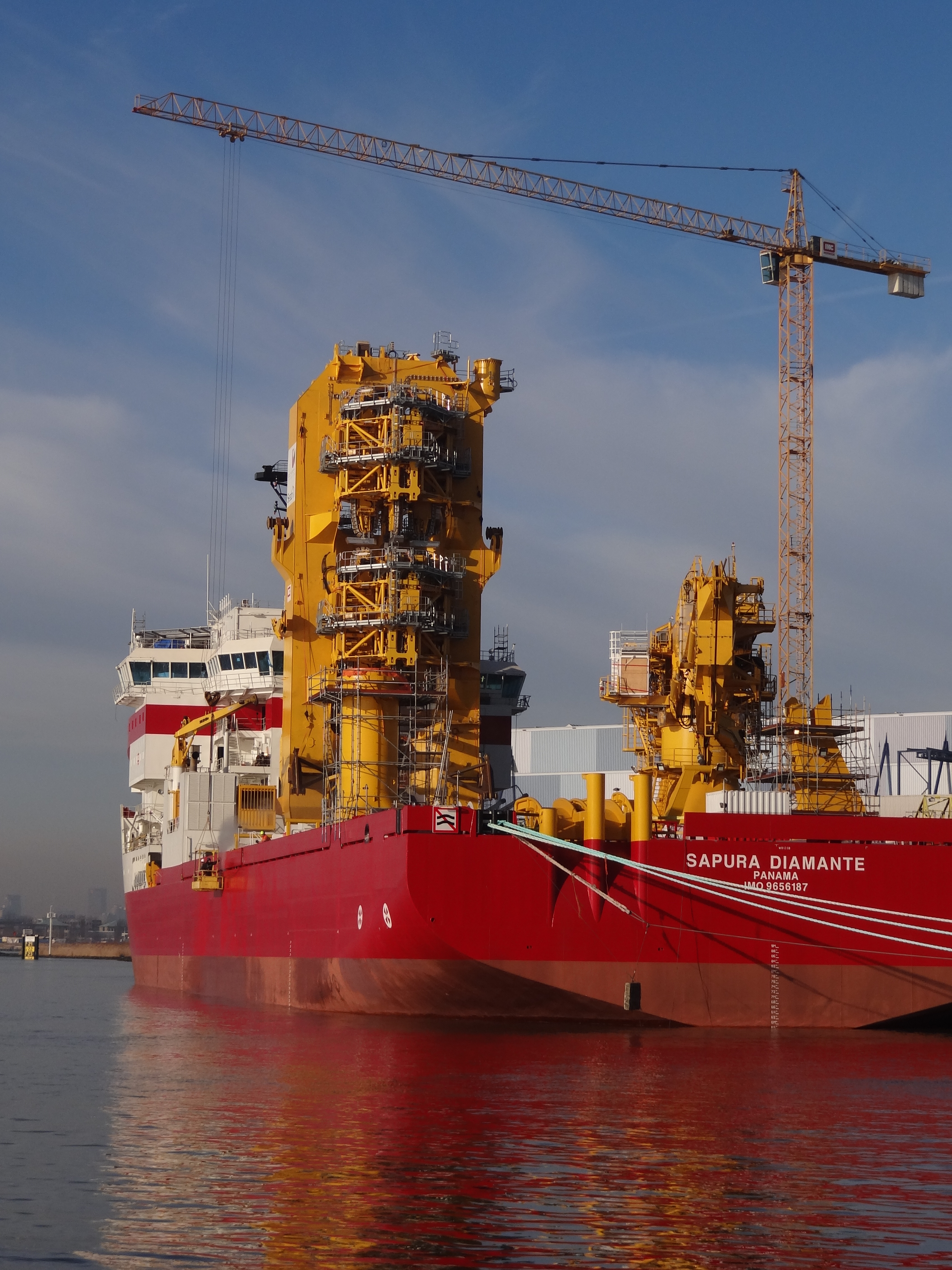 Waterbus van Dordrecht naar Rotterdam